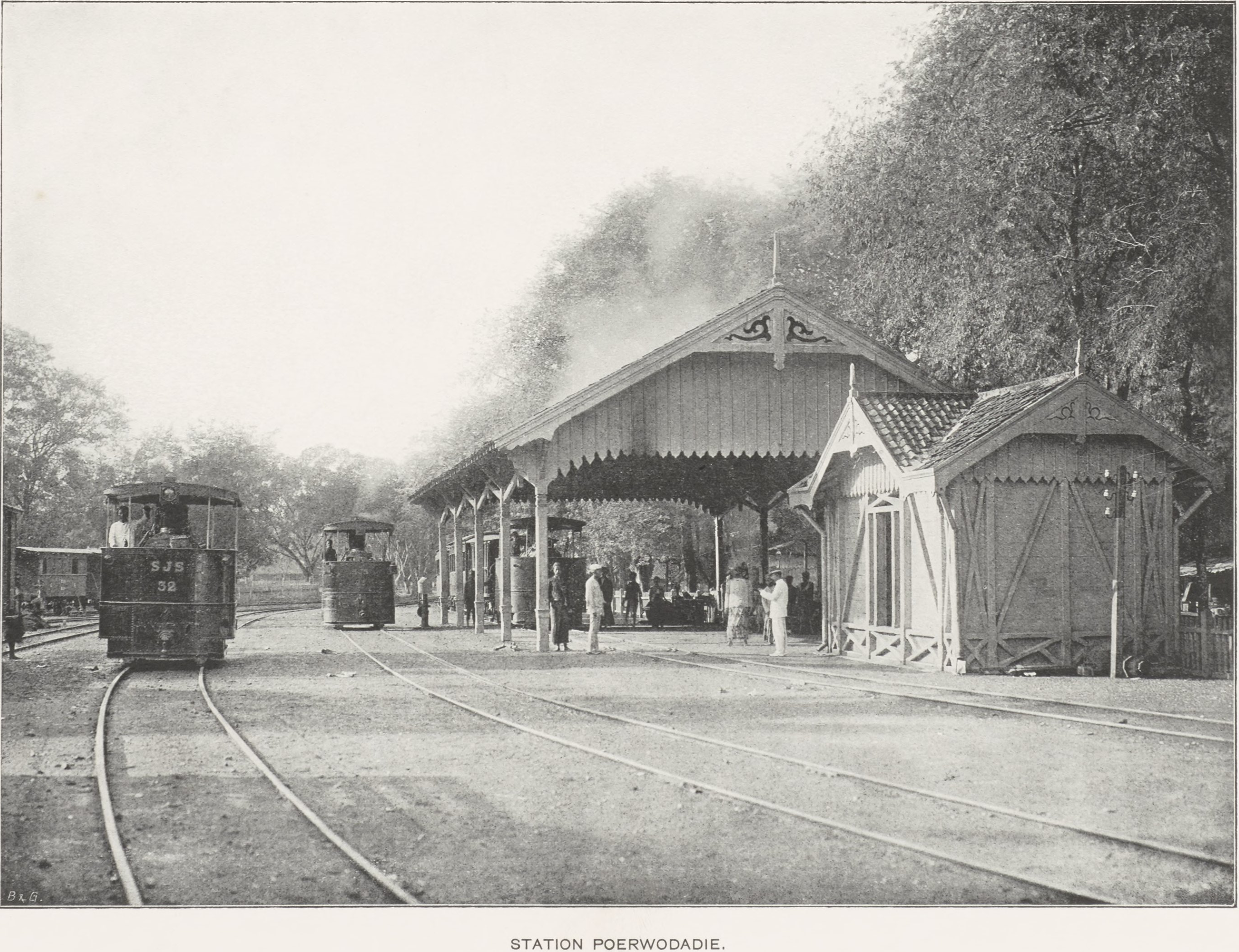 Stasiun Purwodadi